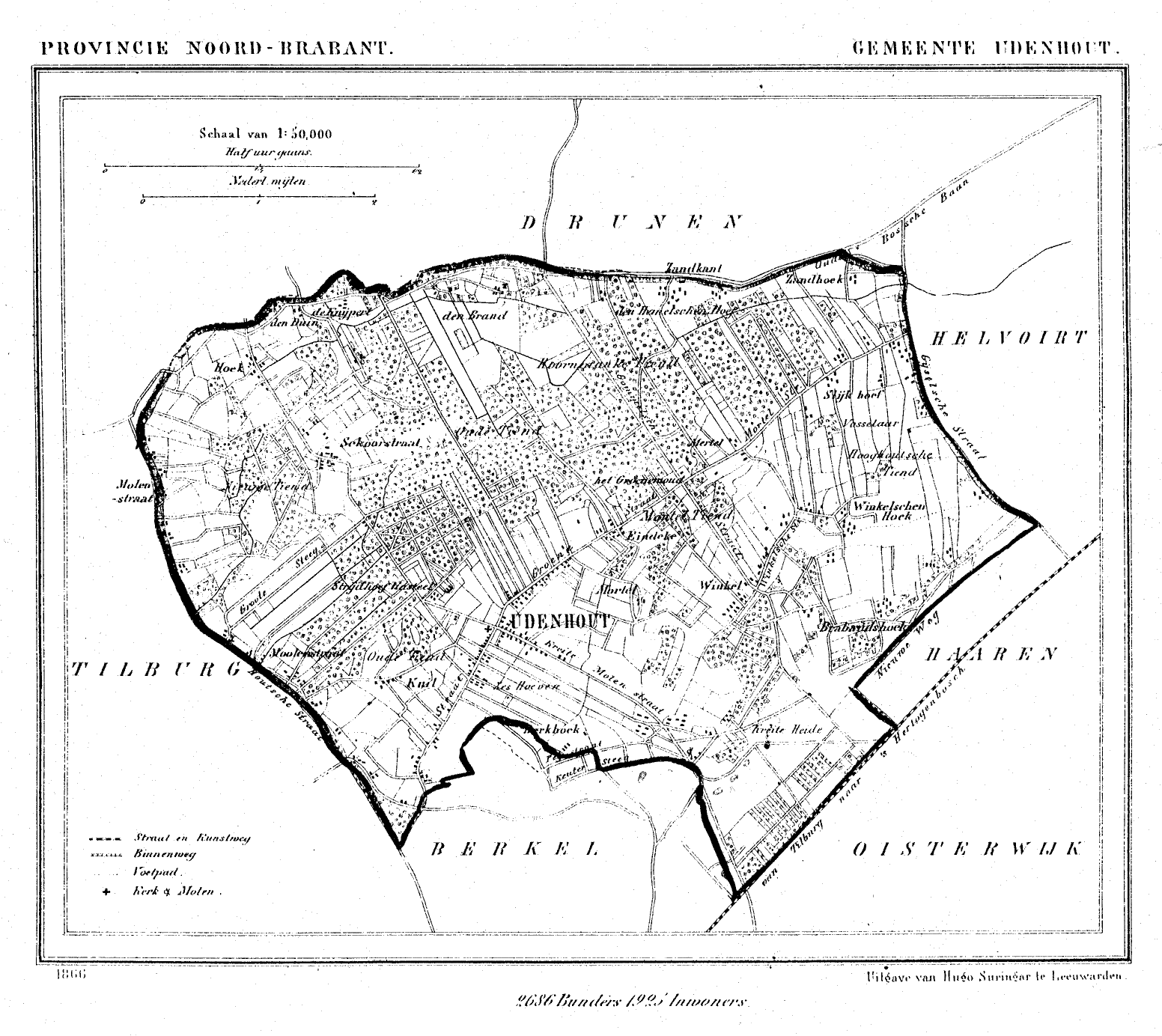 Nederland, Noord-Brabant, Gemeente Udenhout